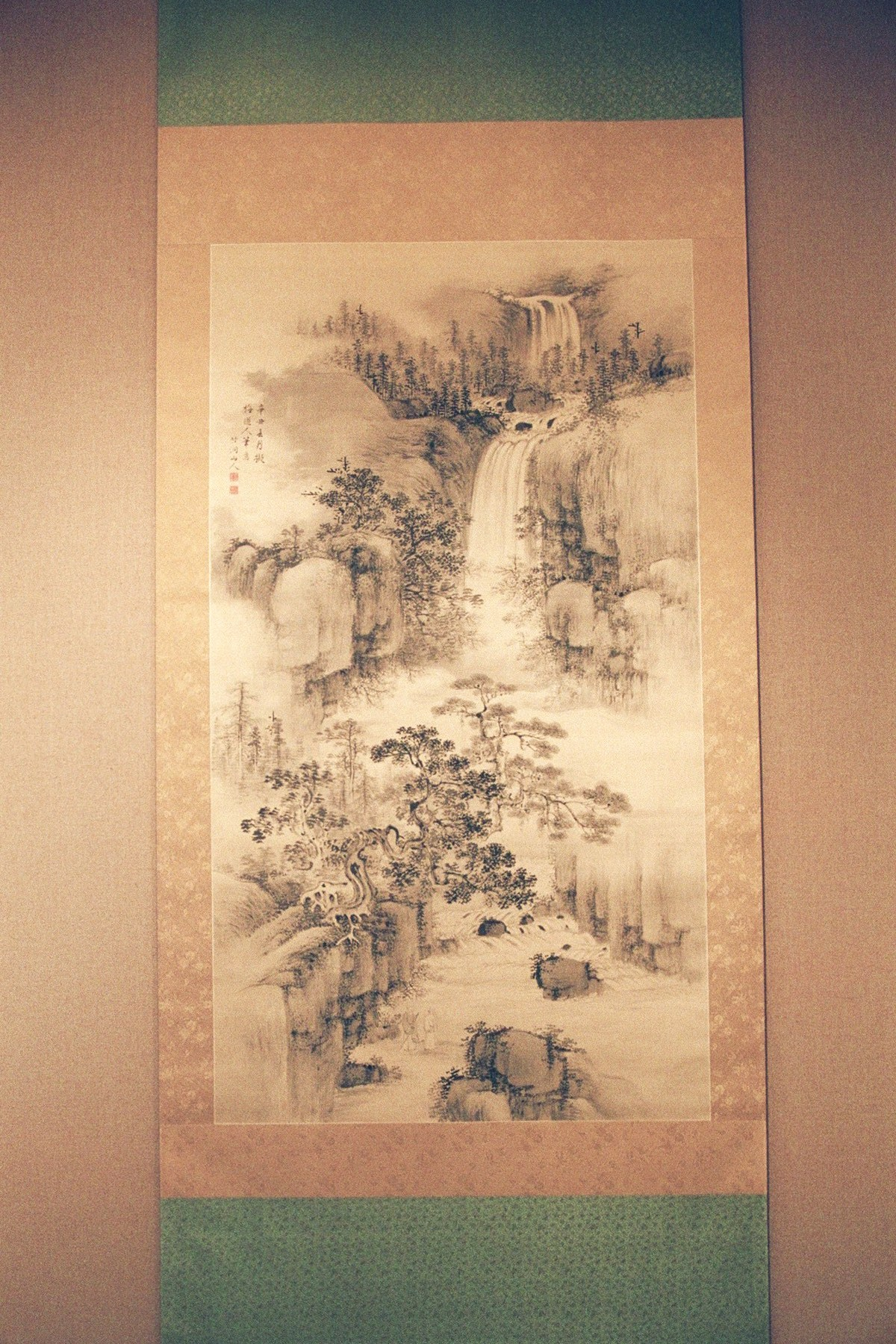 Photographie d'une peinture Japonaise de style Sansui, prise au Metropolitan Museum of Art à New-York City